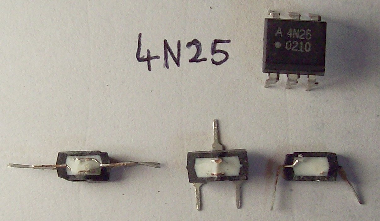 Aufgeschnittene 4N25-Optokoppler. Untere Reihe: Aufgeschnittene Optokoppler, rechts oben: Original